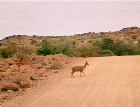 Oreotragus oreotragus